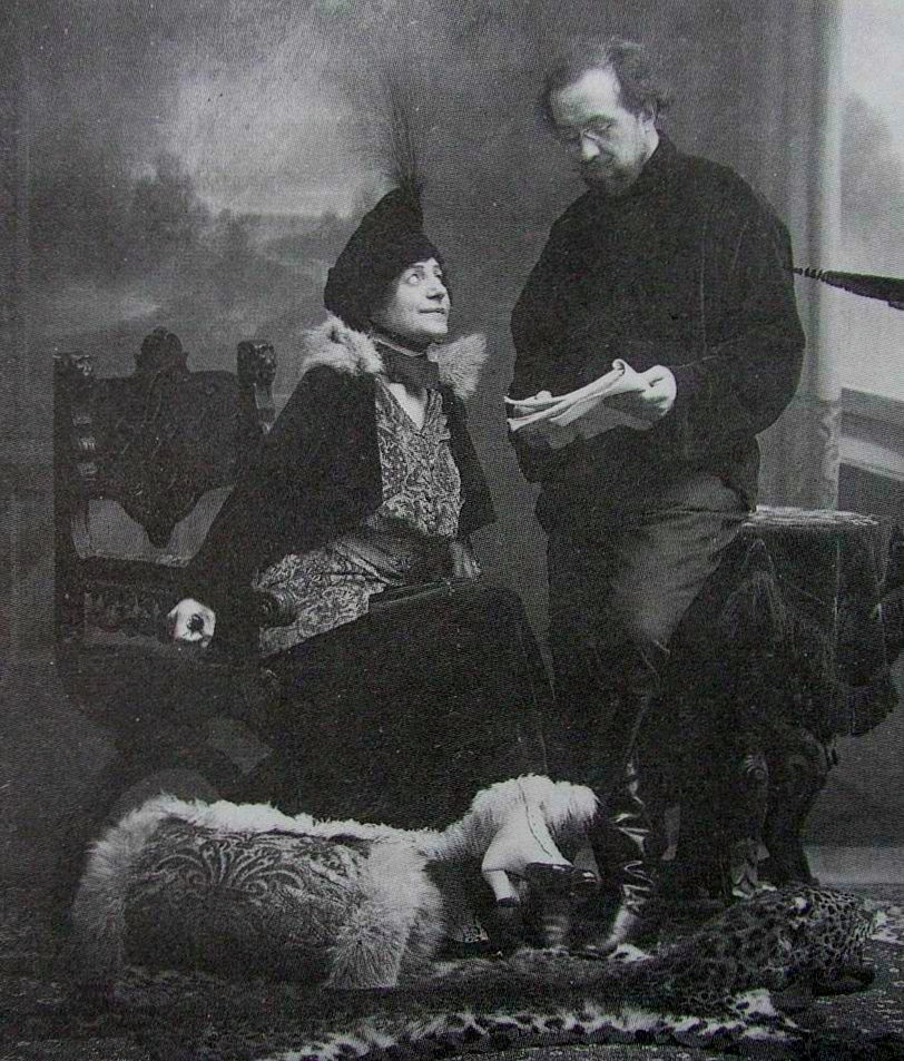 Драматург Михаил Арцыбашев читает свою пьесу «Закон дикаря» актрисе Л. Б. Яворской.